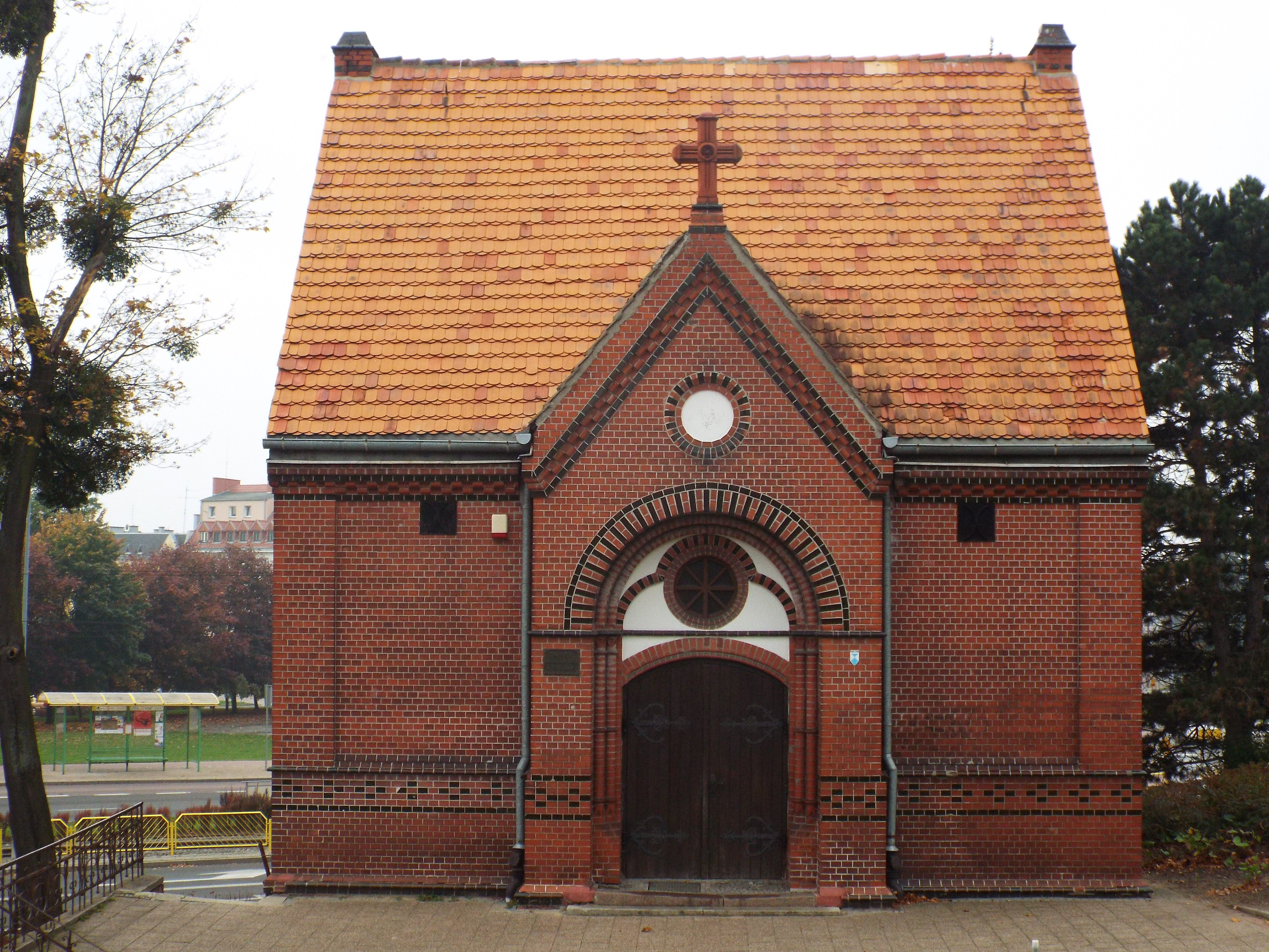 Elbląg, ul. Traugutta 15 - pierwotnie ewangelicka kaplica cmentarna p.w. św. Anny, obecnie cerkiew greckokatolicka św. Jana Chrzciciela, 1902